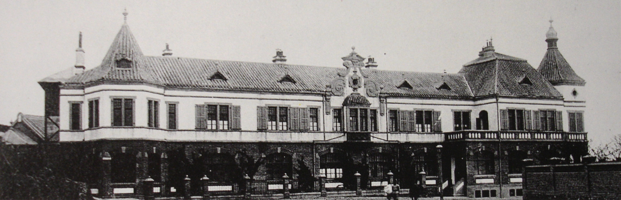 青岛圣言会旧址西翼老照片